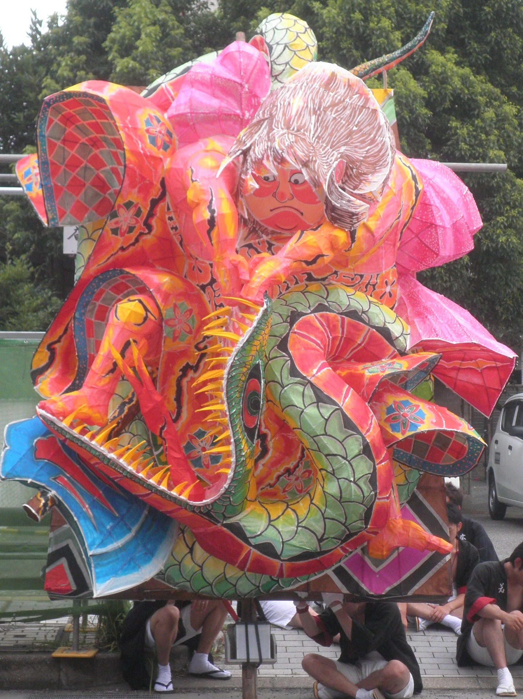 愛知県の無形民俗文化財に指定されている刈谷市の万燈祭り 2013年7月28日(日)の「本楽」における「広小路5組」の万燈